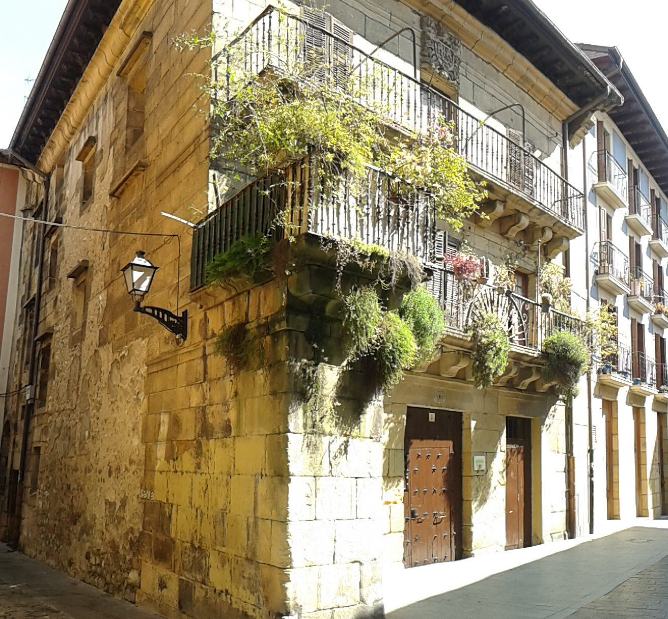 Zubiaurre jauregia, Errenterian